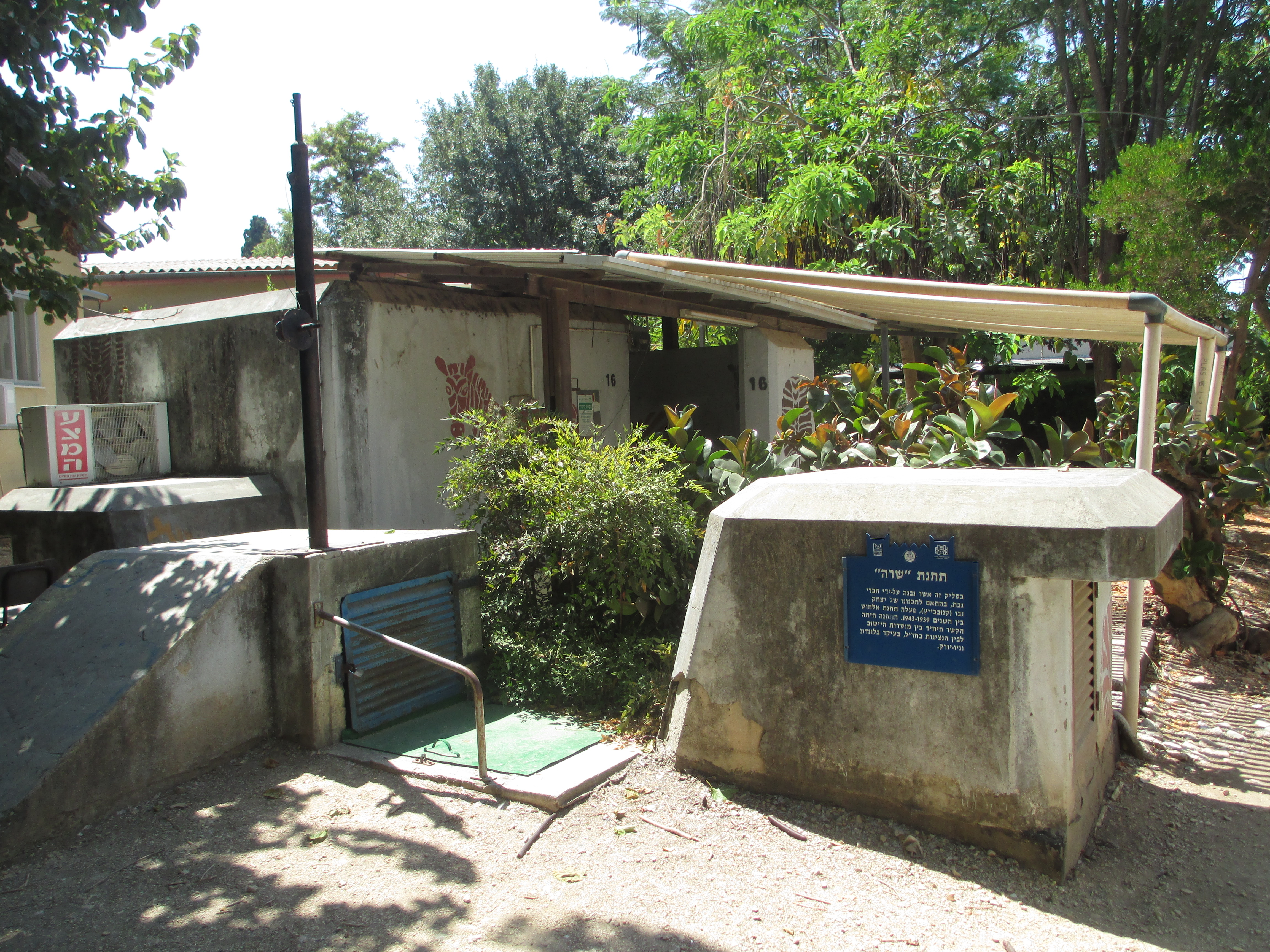 תחנת האלחוט שרה בקיבוץ גבת